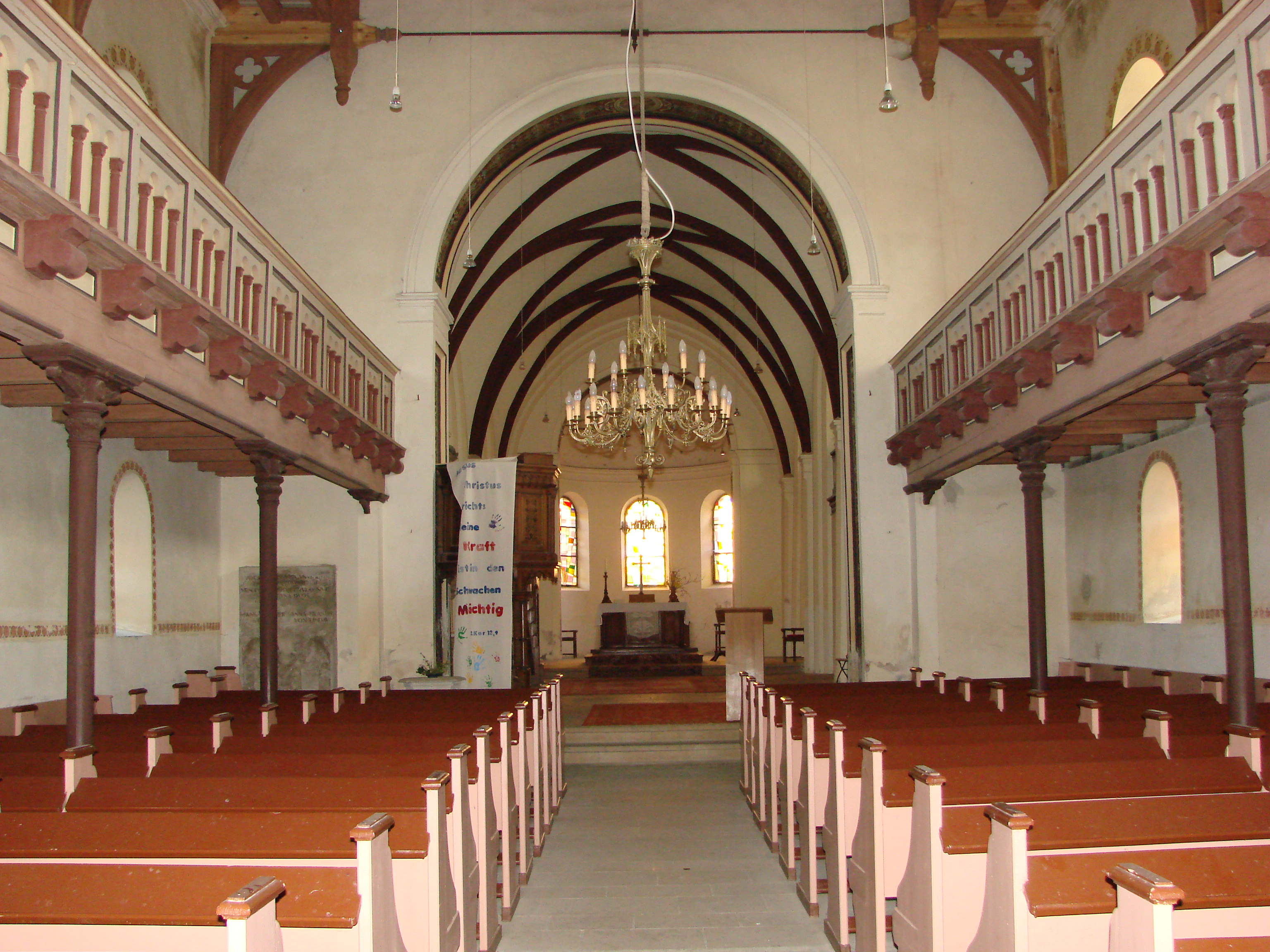 Die Kirche ist ein Baudenkmal. Neugotisches Gewölbe im Chor.